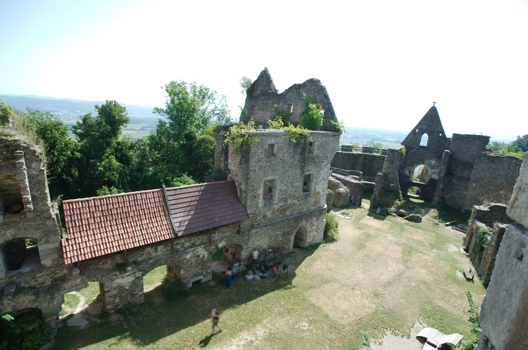 Burgruine Schaunberg in Schaumberg, Oberösterreich, Blick auf den inneren Burghof